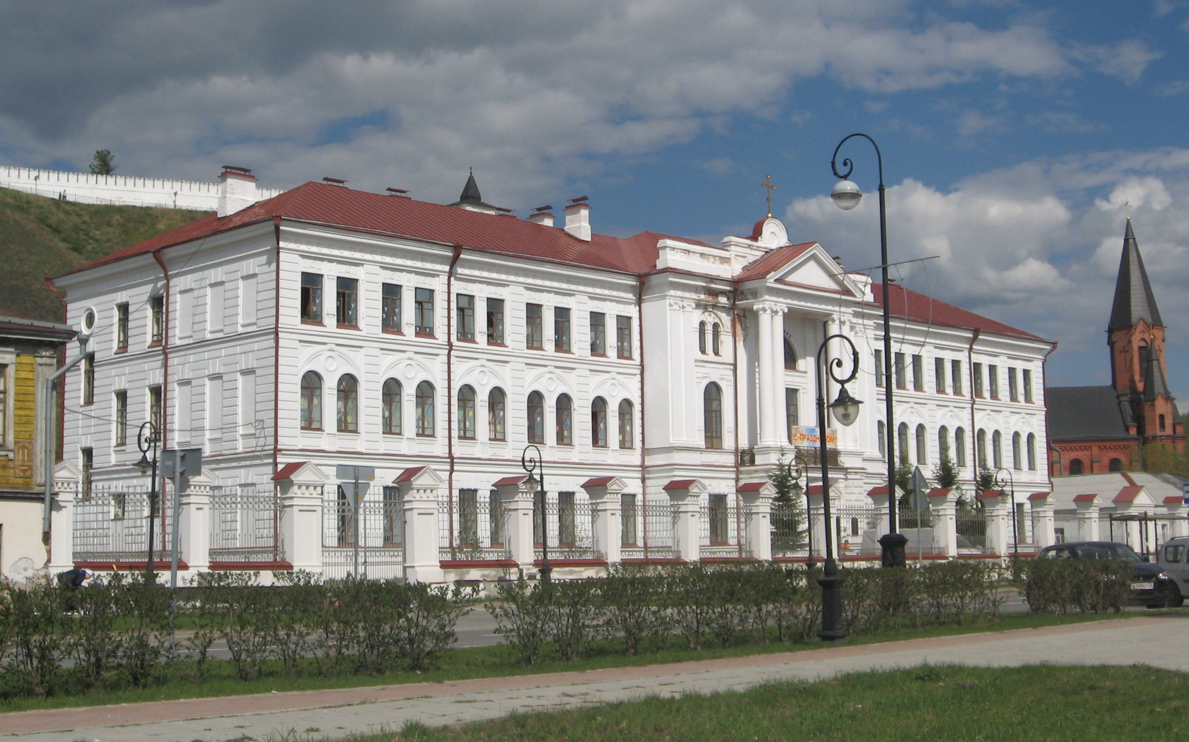 Здание гимназии: ул. Розы Люксембург, 7а (Тобольск)